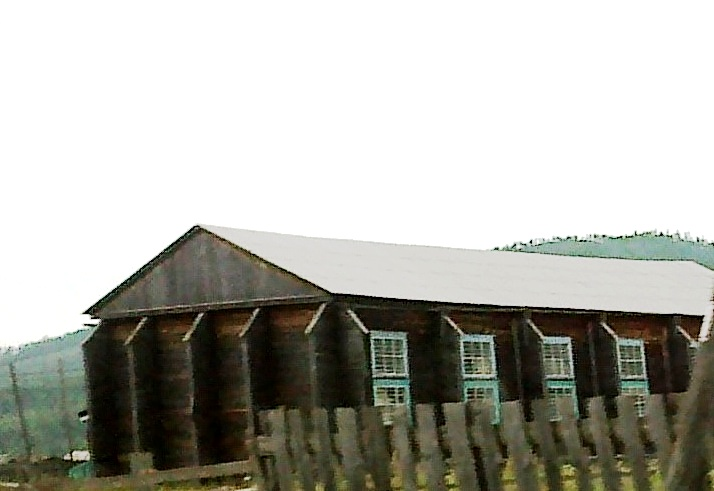 Спортзал в Бортое